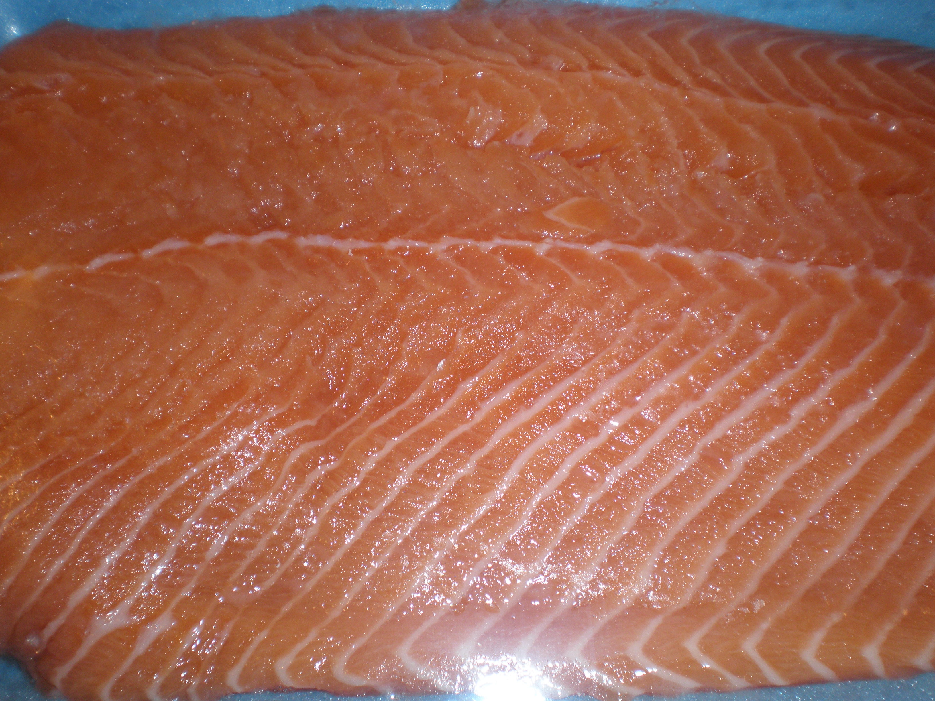 A fillet of salmon